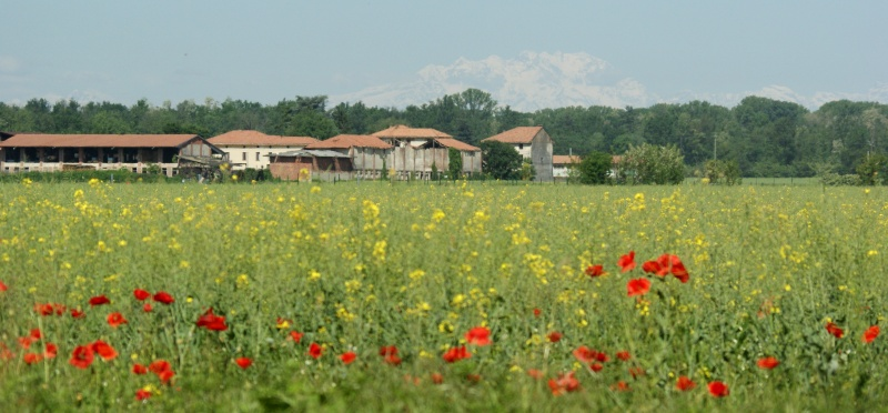 Origgio, campi e boschi